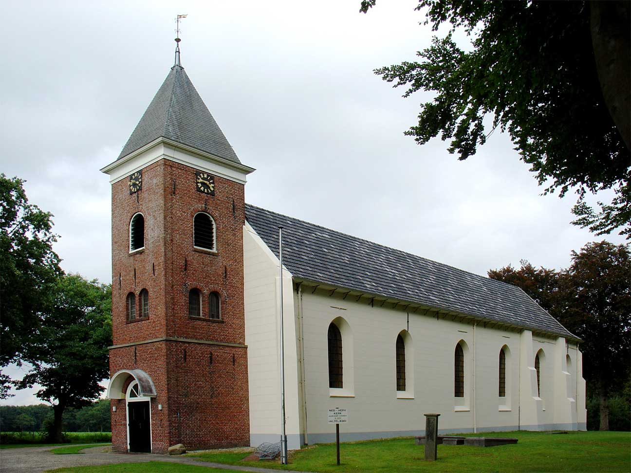 Kerk van Vlagtwedde